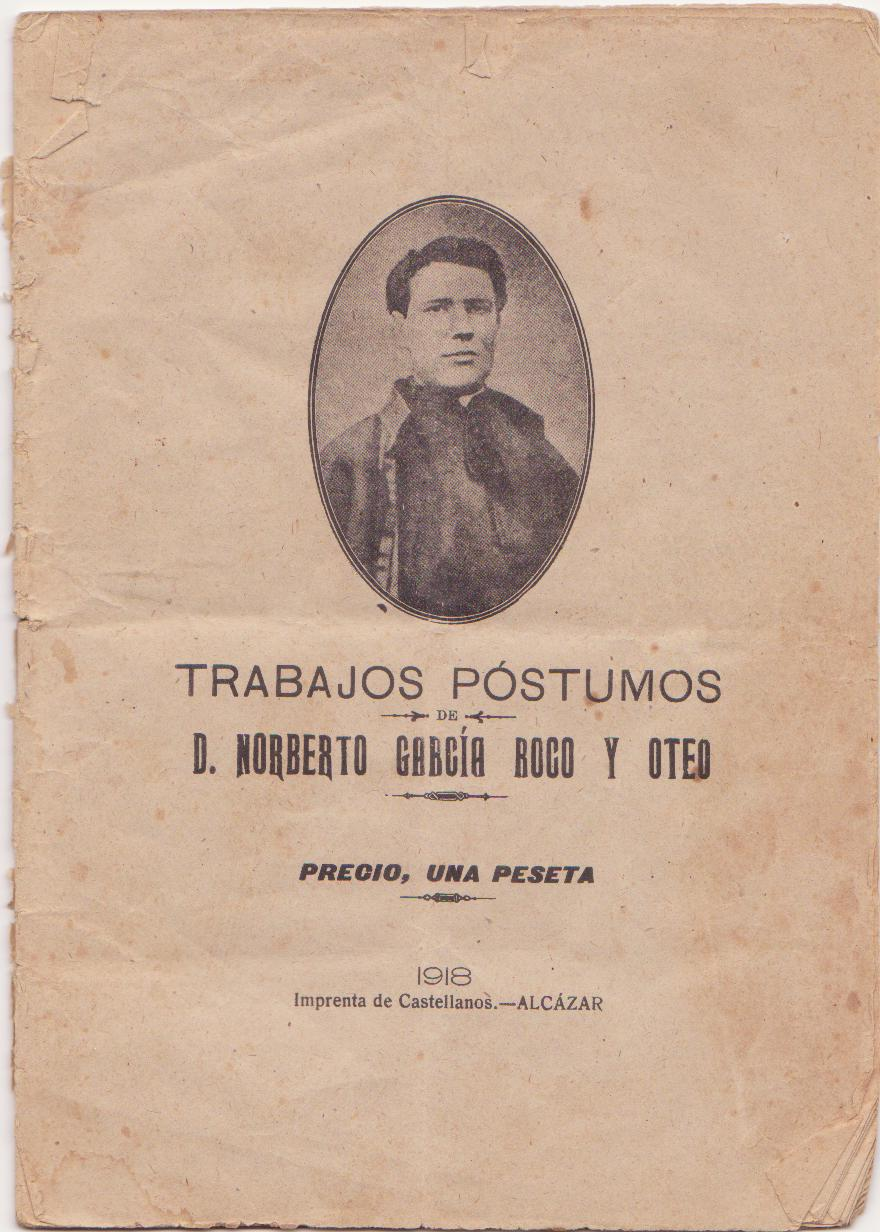 Portada folleto trabajos póstumos de Norberto García Roco